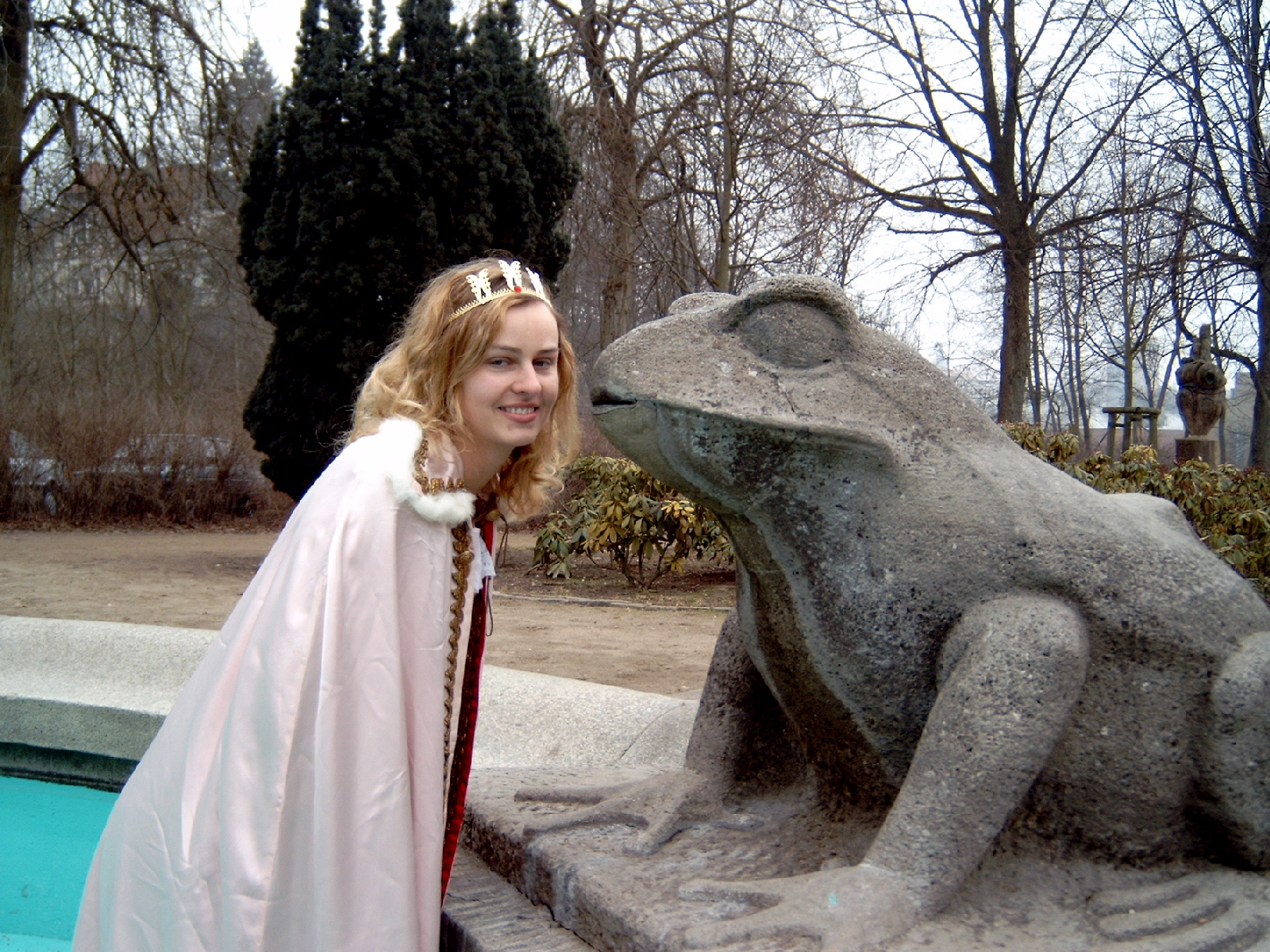 Carlisle-Park Flensburg - Der Froschkönig, arrangiert am Froschbrunnen... mit Modell Kris; Im Hintergrund rechts eine Ulmenskulptur die heute nicht mehr existiert